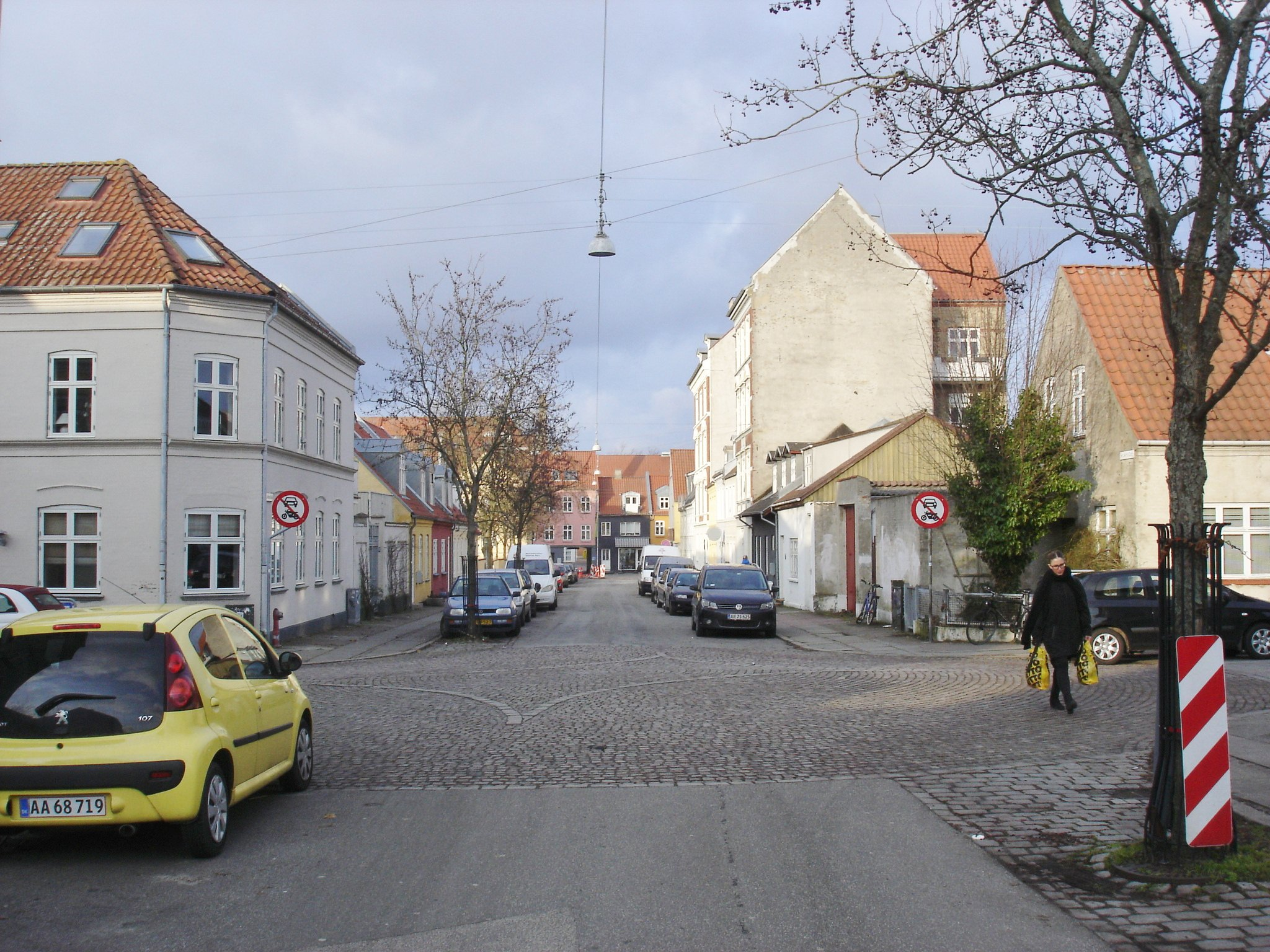 Sankt Anna Gade i Aarhus krydser Ole Rømers Gade